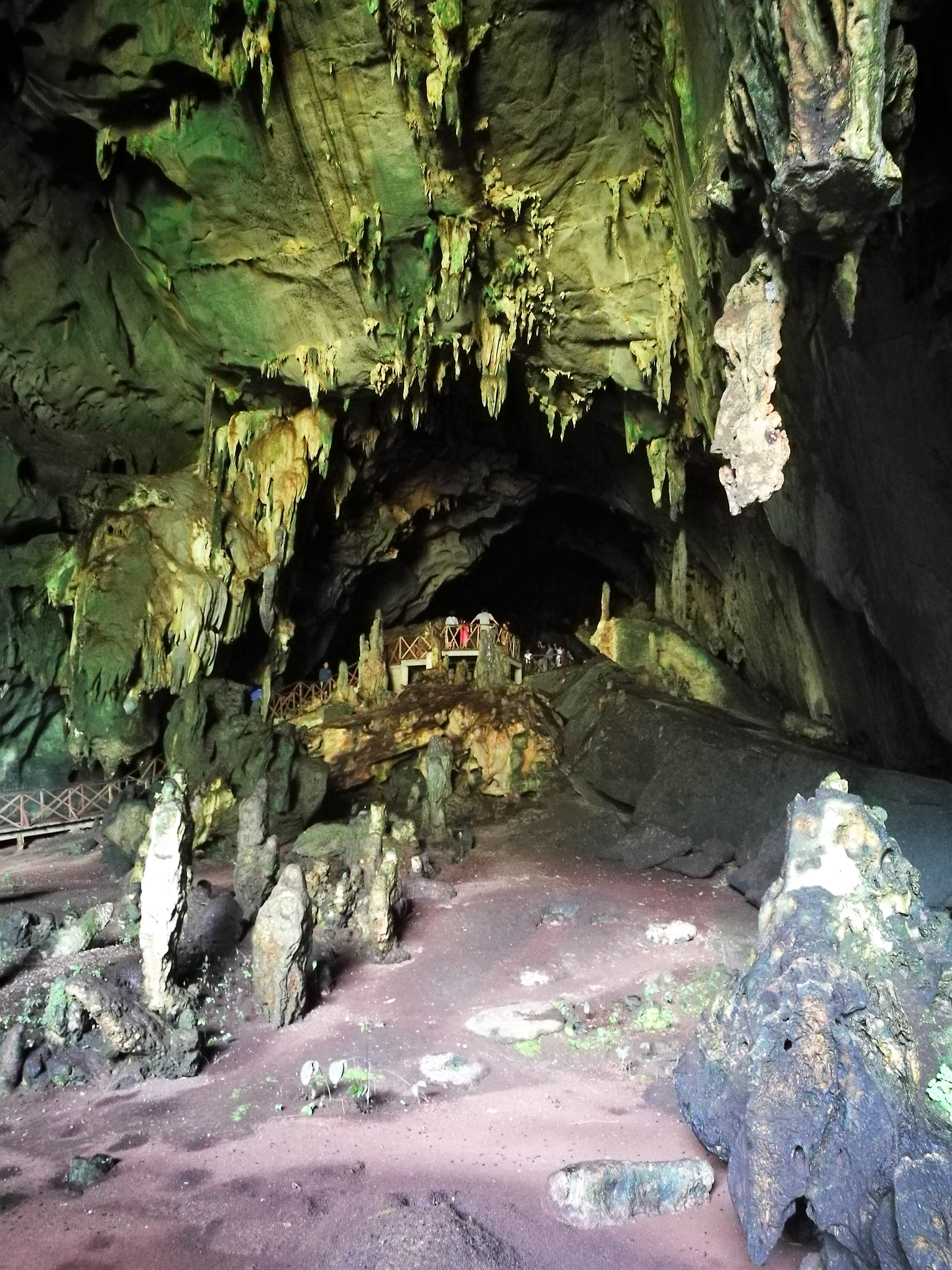 Cueva de las Lechuzas, al Parc Nacional de Tingo María